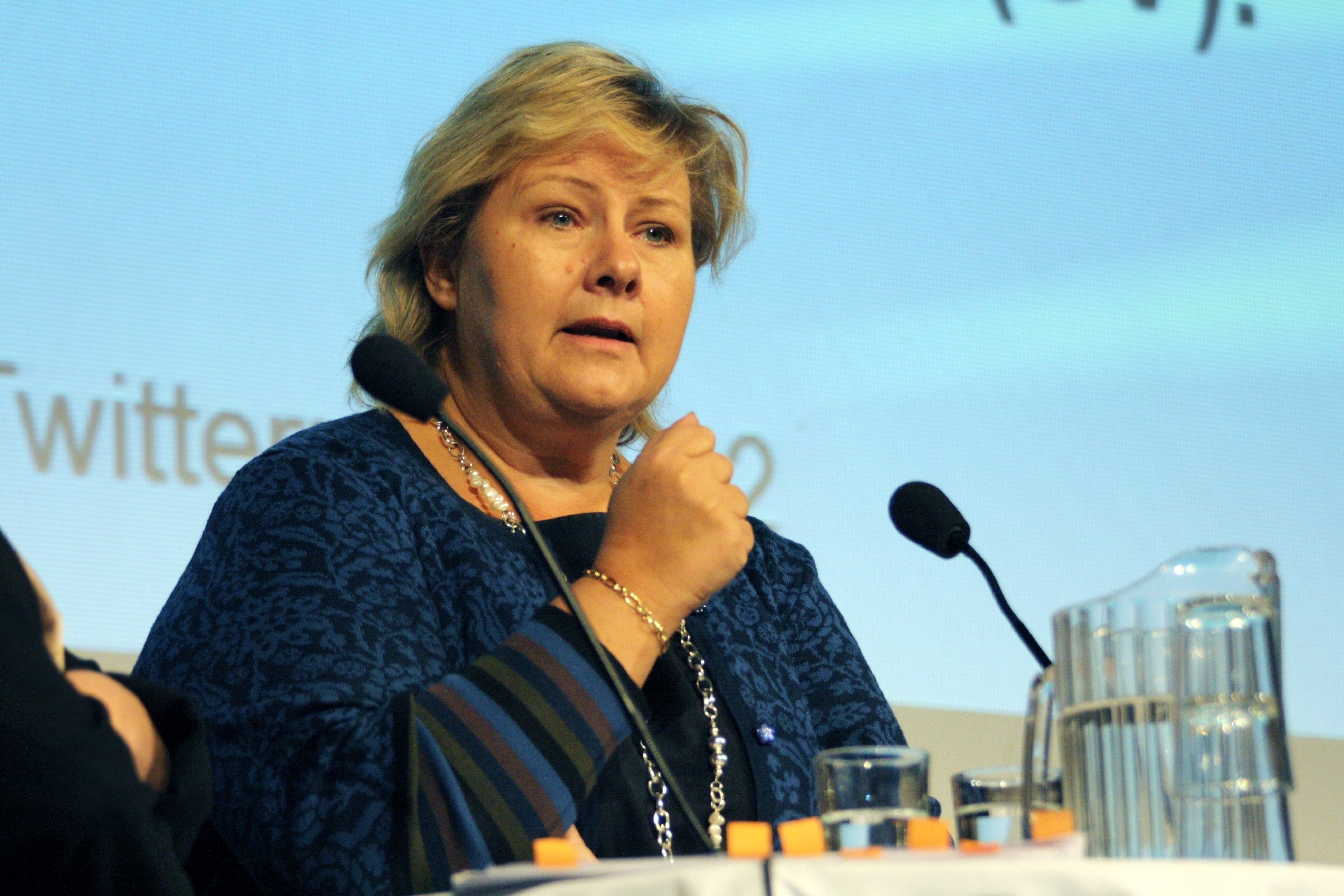 Høyres partileder Erna Solberg.